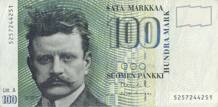 100 markkaa